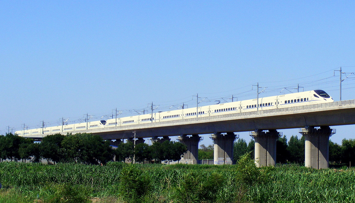 中文（中国大陆）: CRH5A--京沪高铁